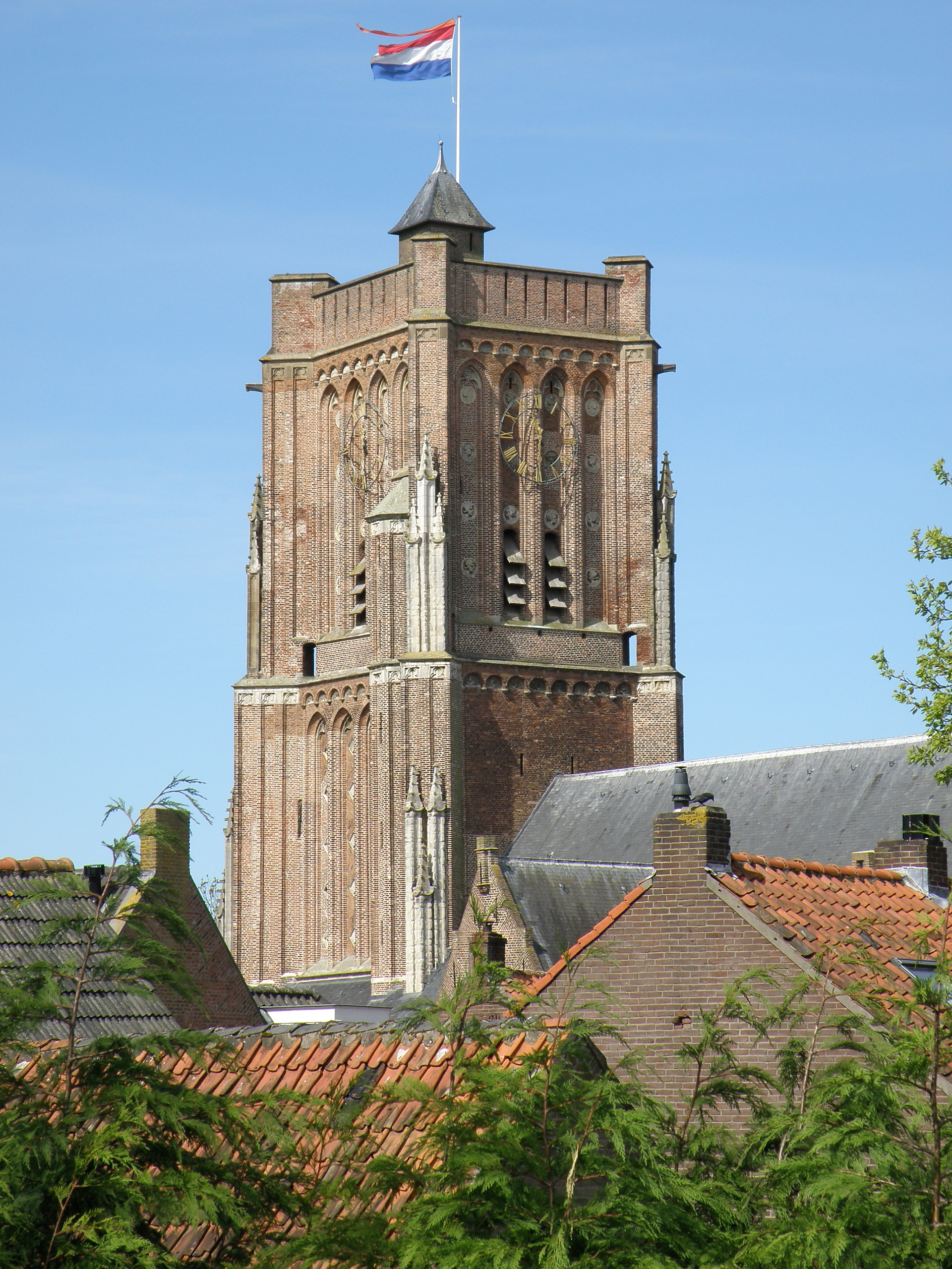 Woudrichem (prov. Noord-Brabant, Nederland). Clocher de l'église Saint-Martin (XVe siècle).